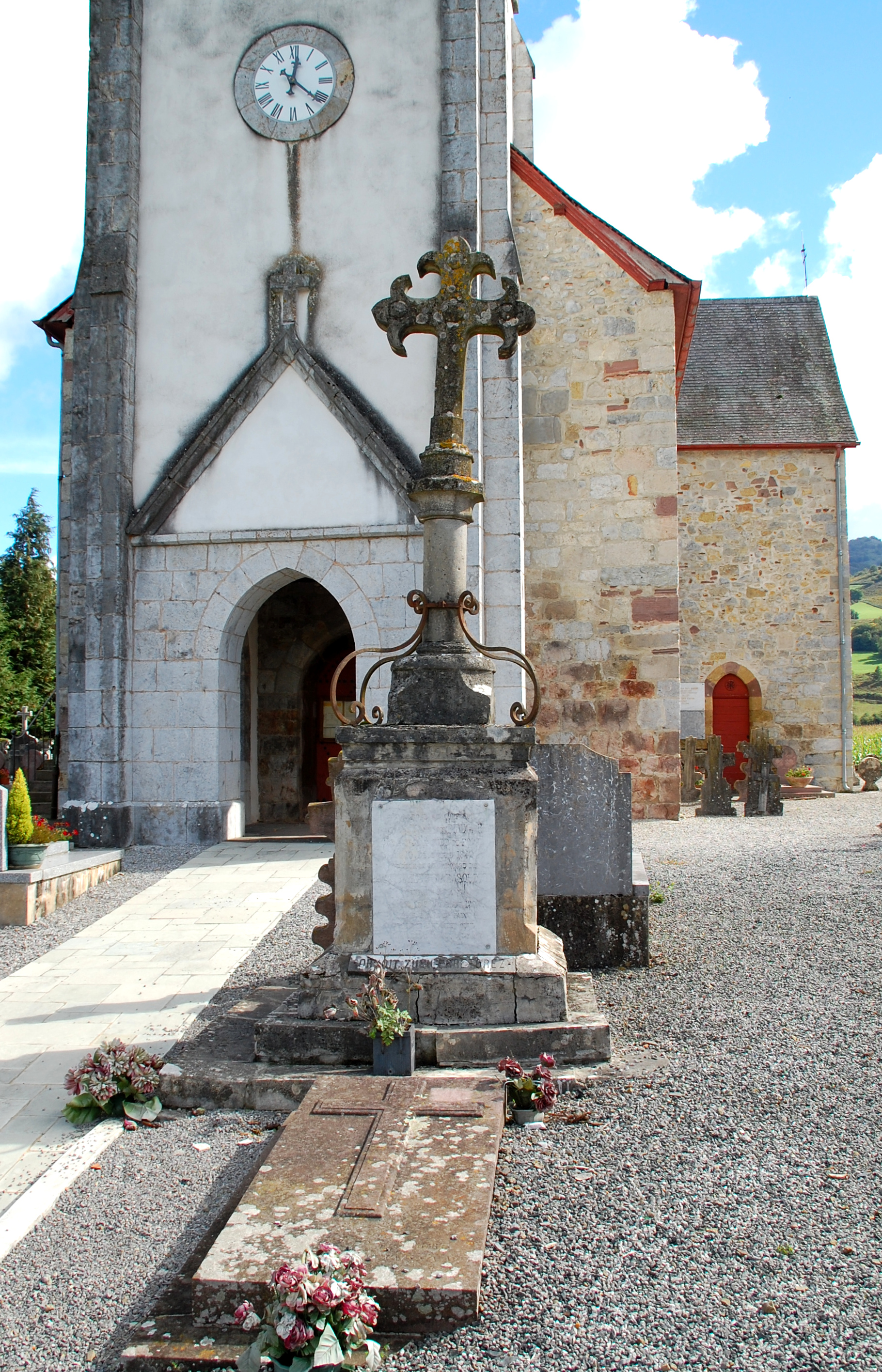 Croix de cimetière